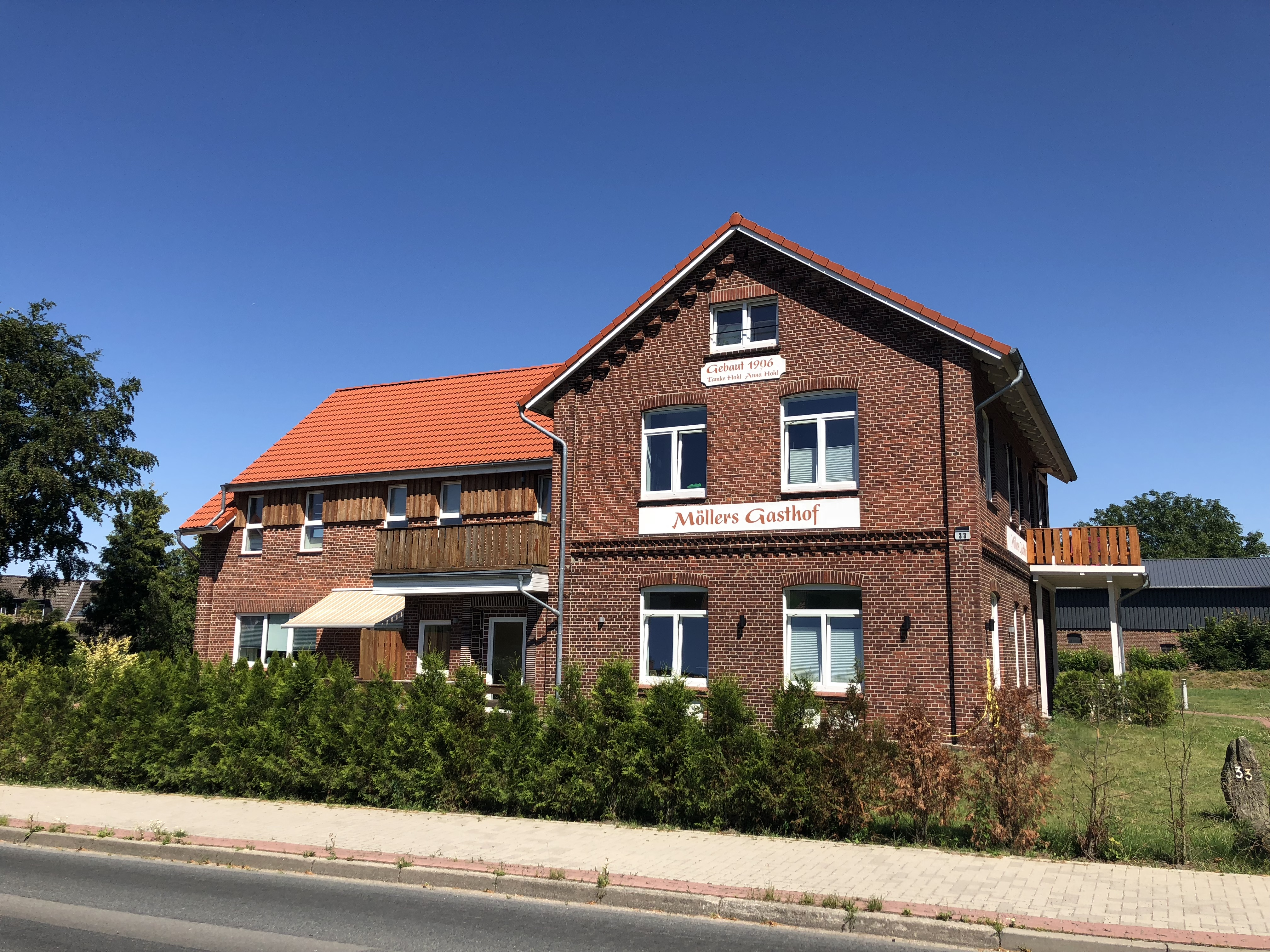 Möllers Gasthoff in Beekdörp